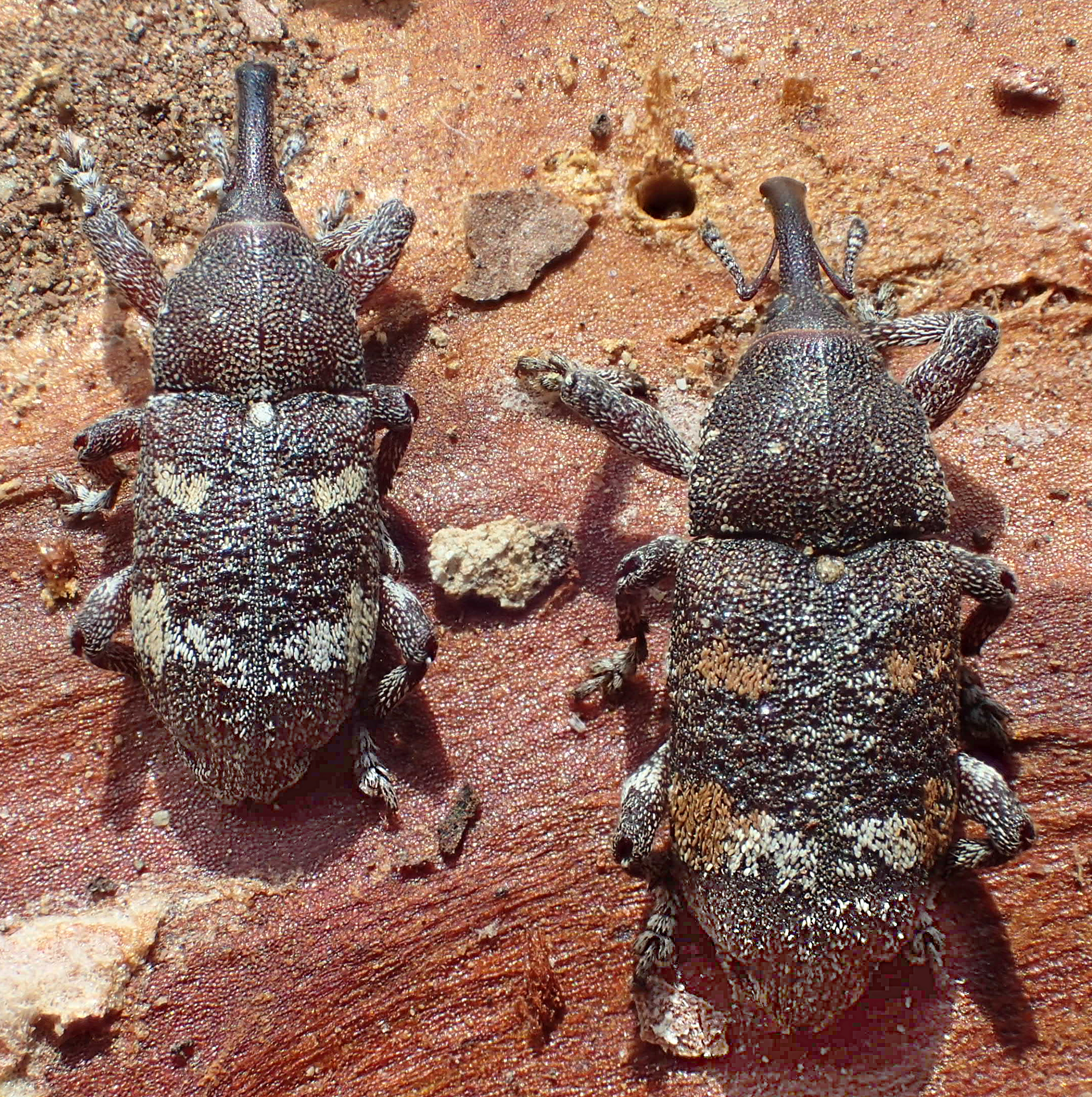 Pissodes castaneus aus Griechenland, Epirus, bei Metsovo, 1357 m